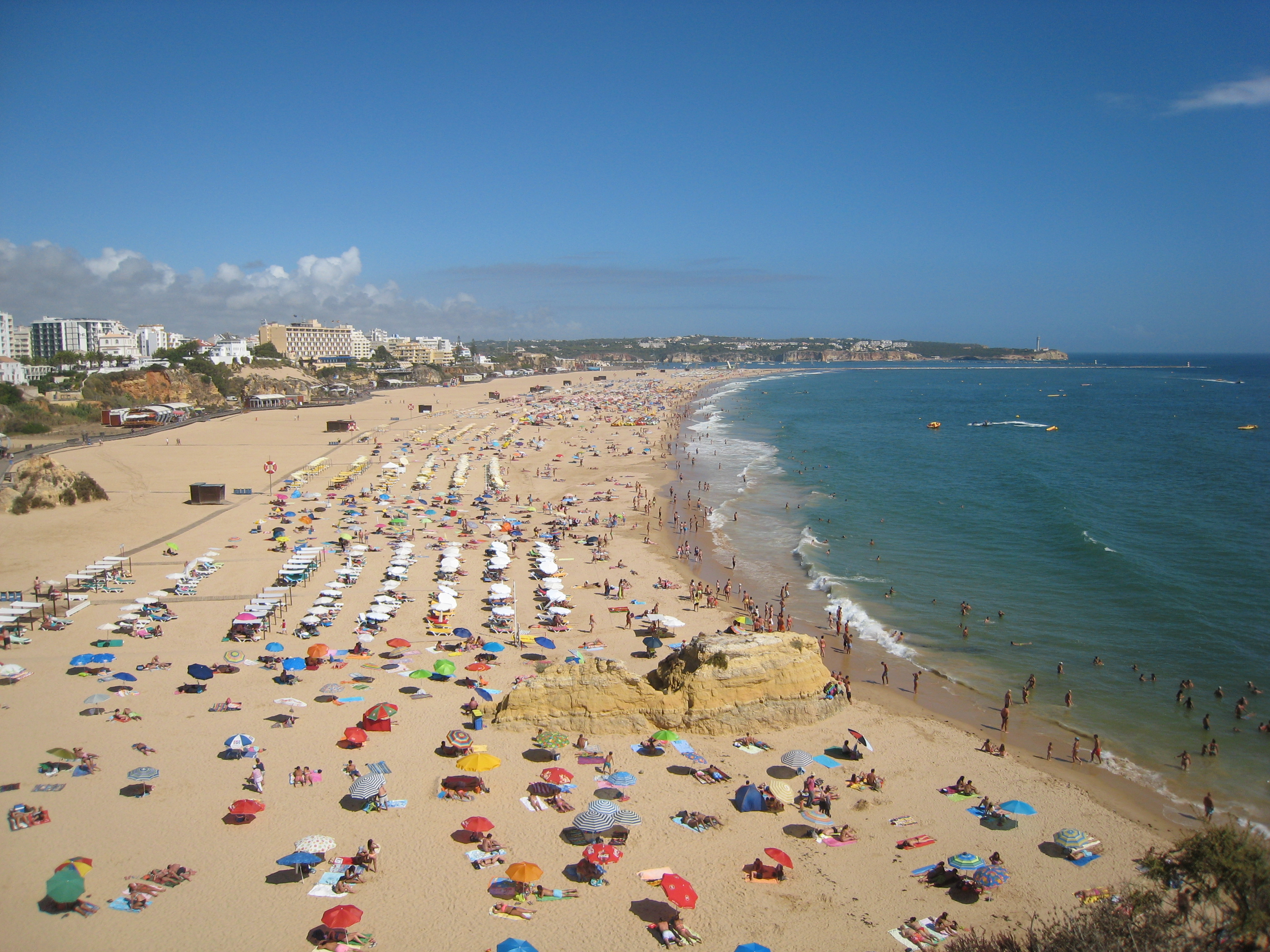 Portimão, Portugal.